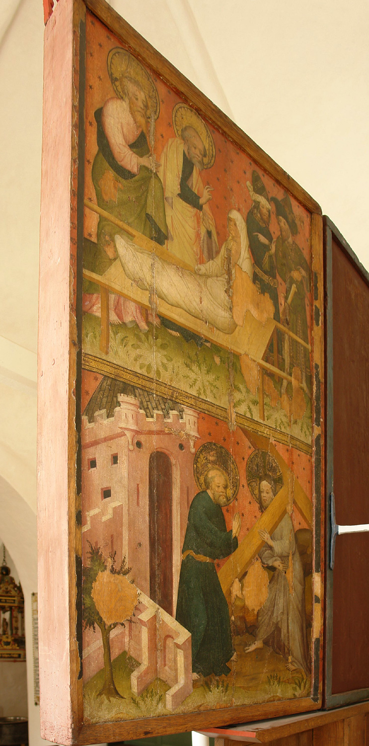 St.-Peter-Kirche in Højer: gotischer Flügelaltar von 1425, wahrscheinlich aus einer Lübecker Werkstatt. Rückseite rechter Flügel.